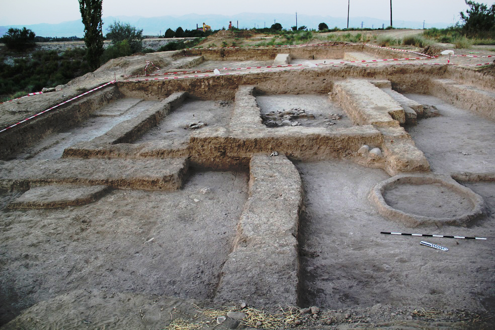 abide